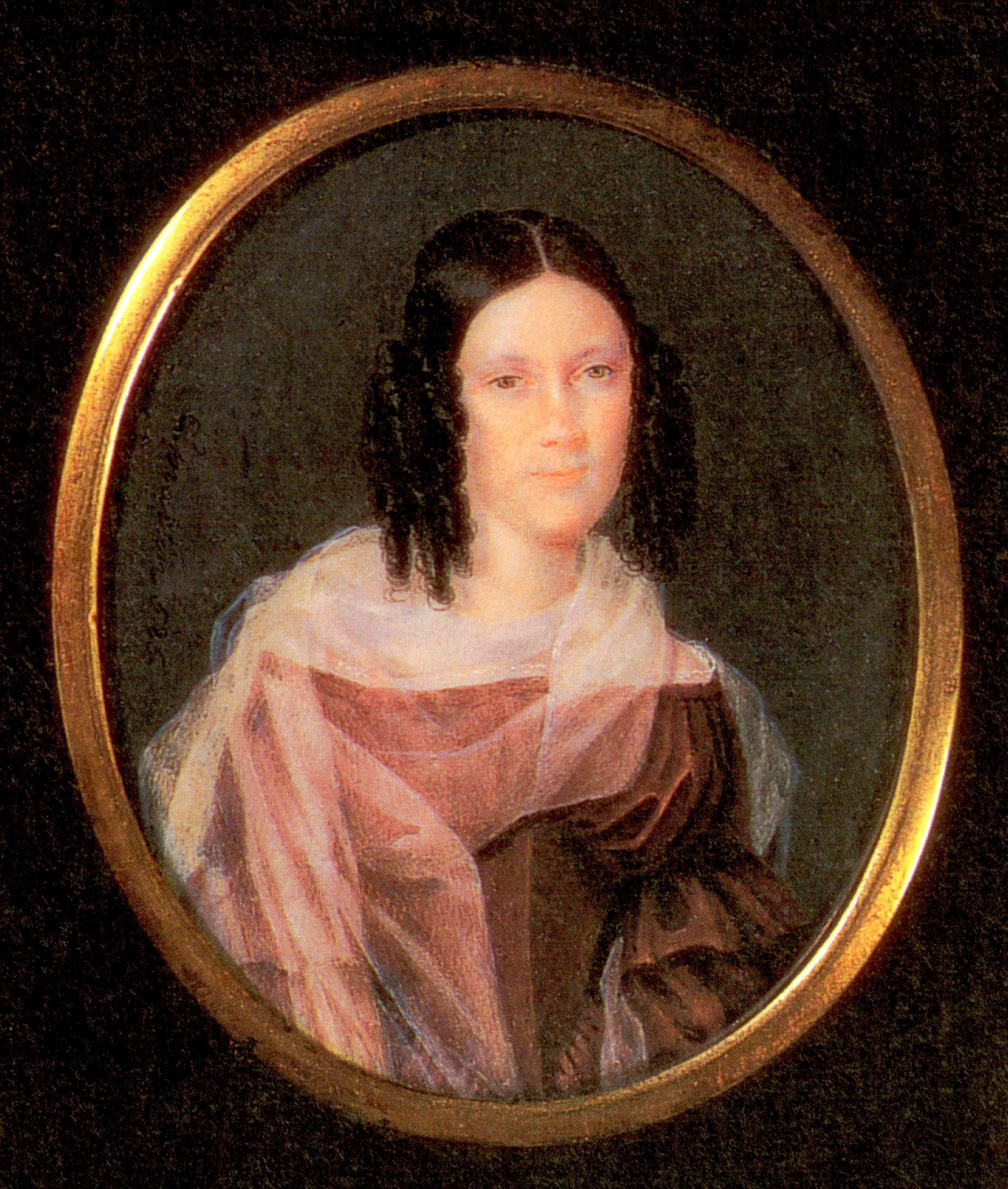 ? А́нна Никола́евна Вульф (1799-1857), соседка А. С. Пушкина по имению и близкий друг поэта.